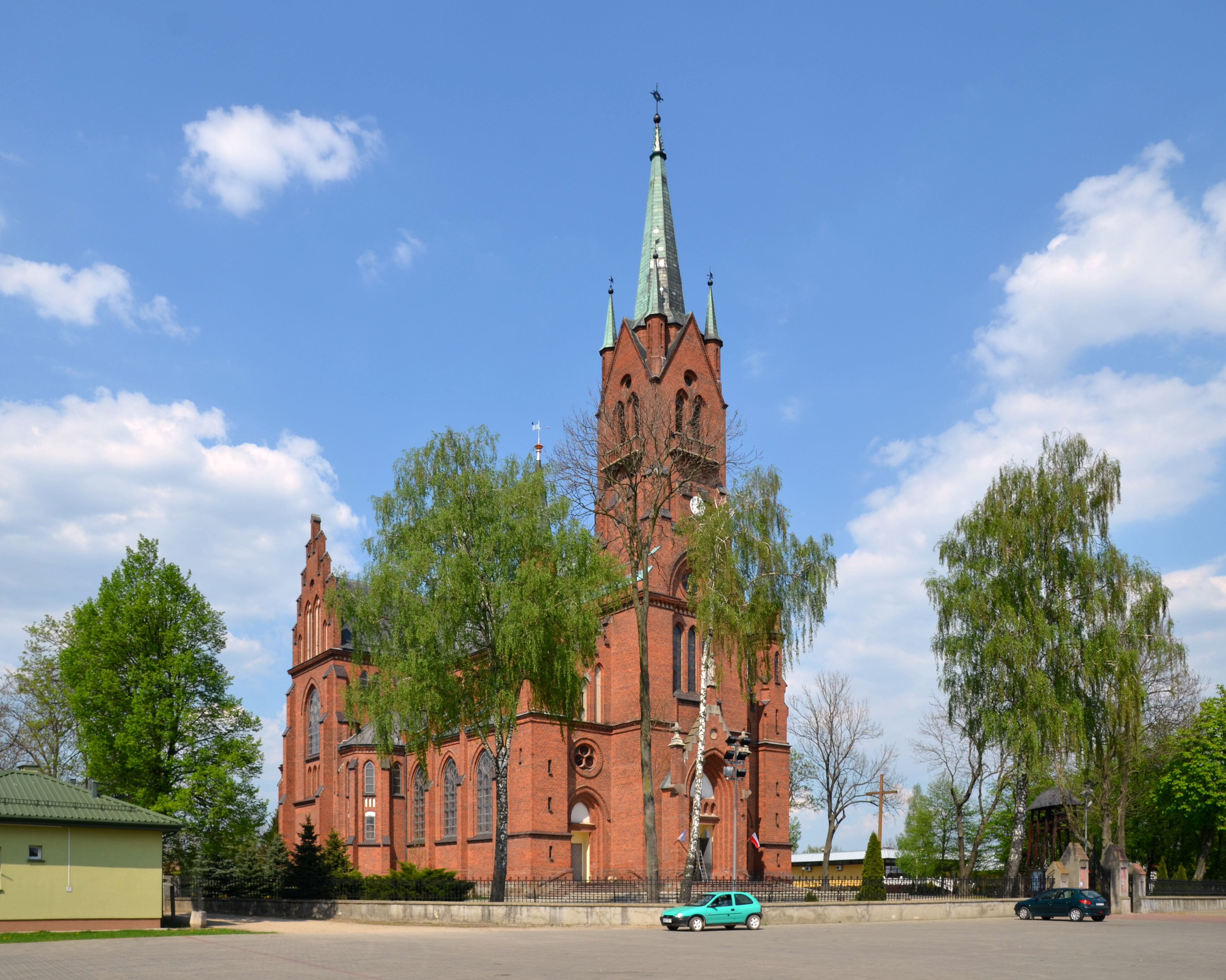 Neogotycki kościół w Latowiczu w woj. mazowieckim.